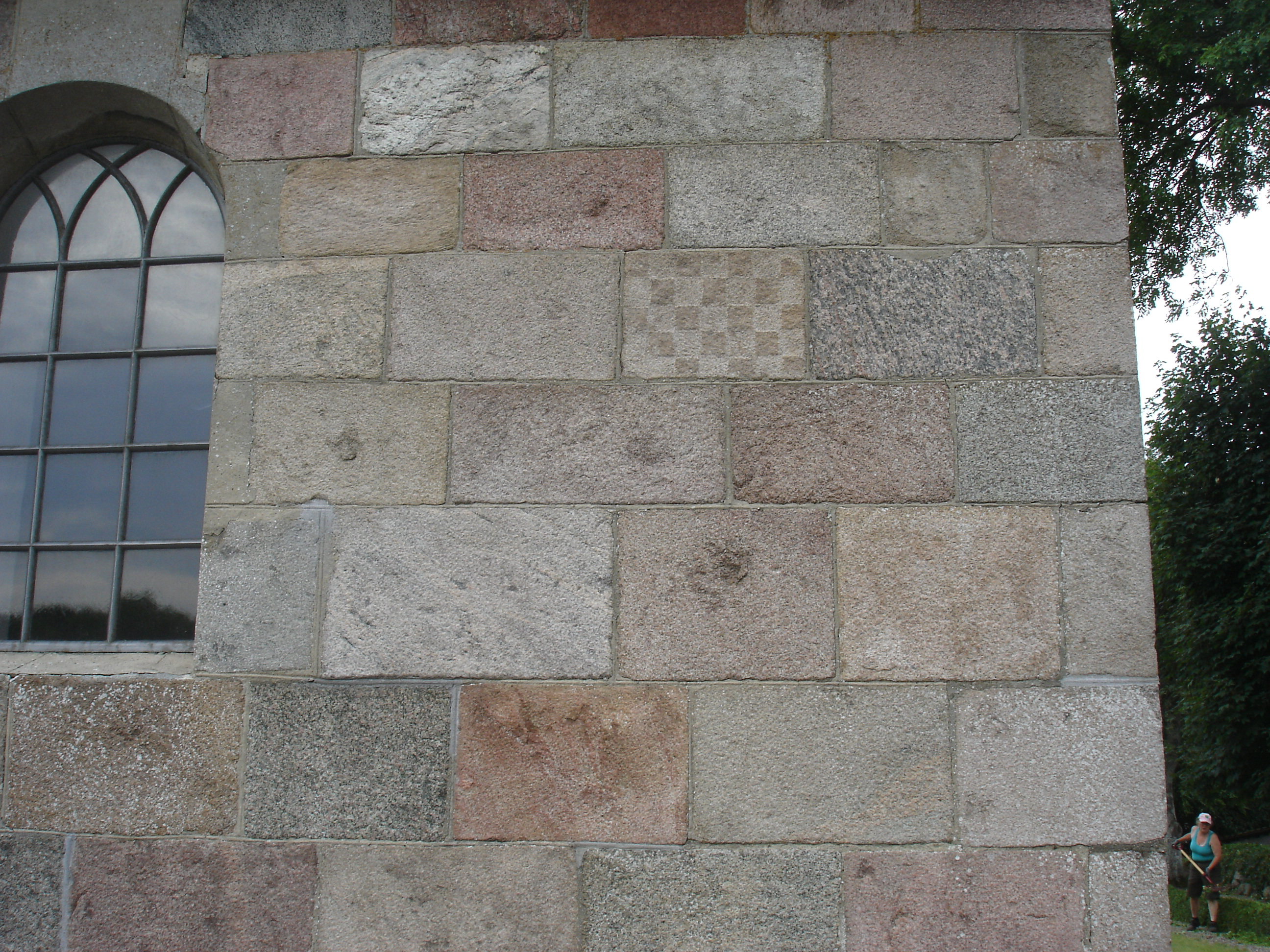 Skakbrætsten på Skivum Kirke i sydsiden af koret